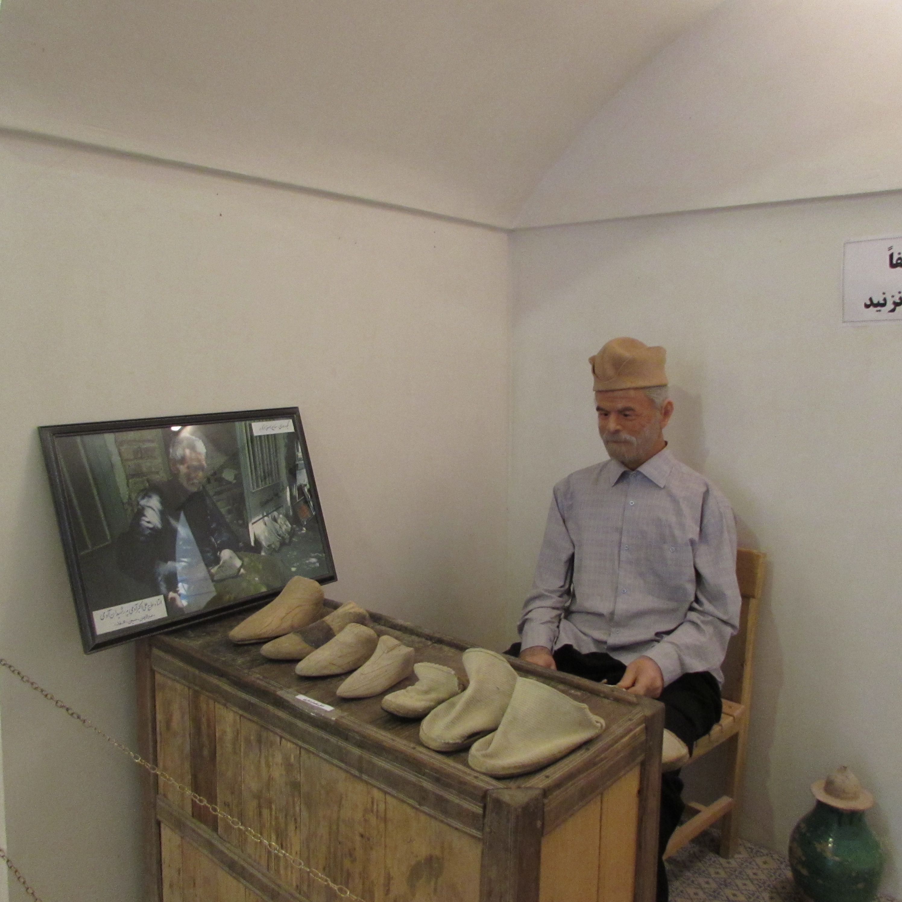 موزه مردم شناسی .خانه صولت .ابرکوه